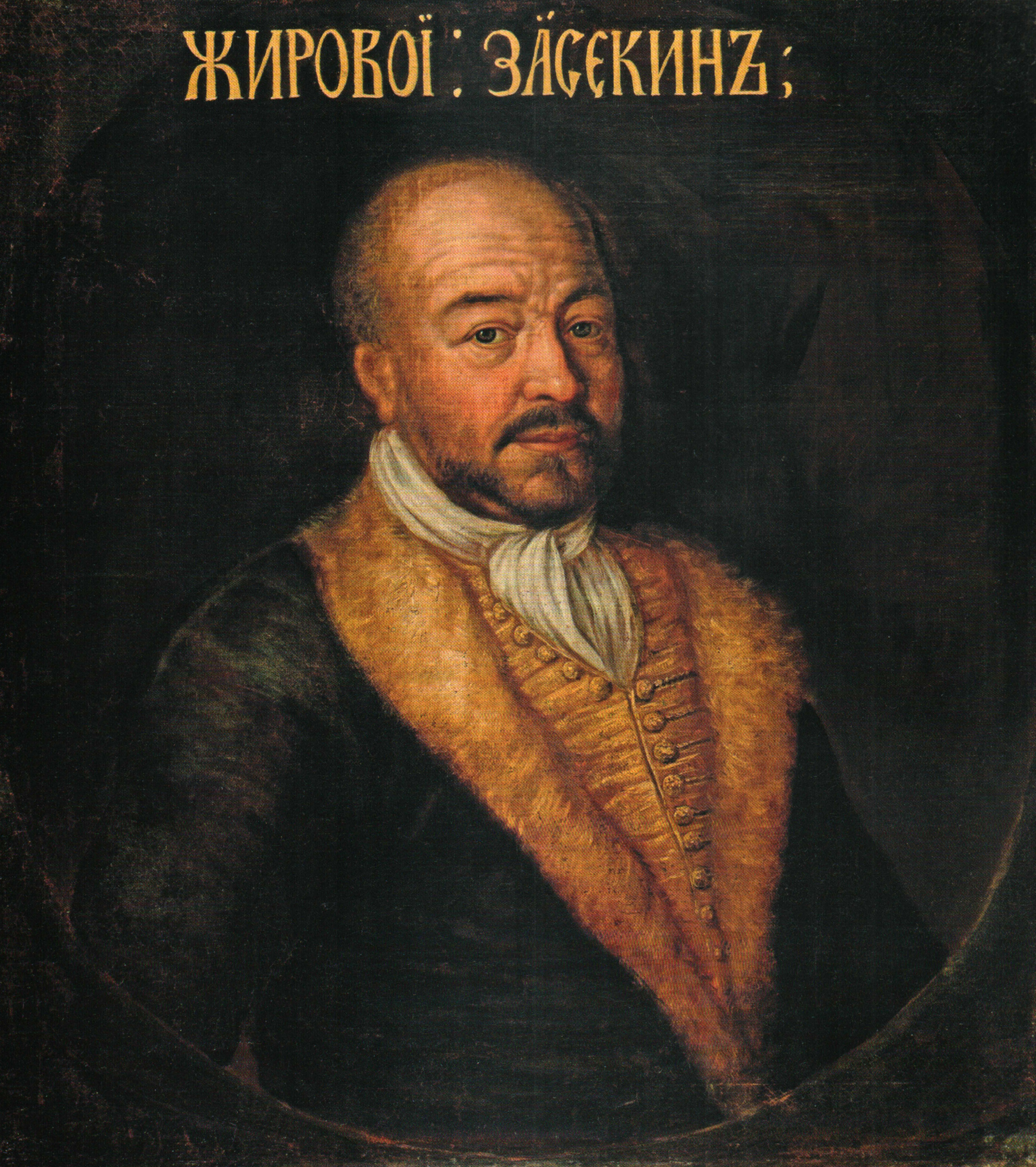 Князь Н.М.Жировой-Засекин. Prince Zhirovoy-Zasekin